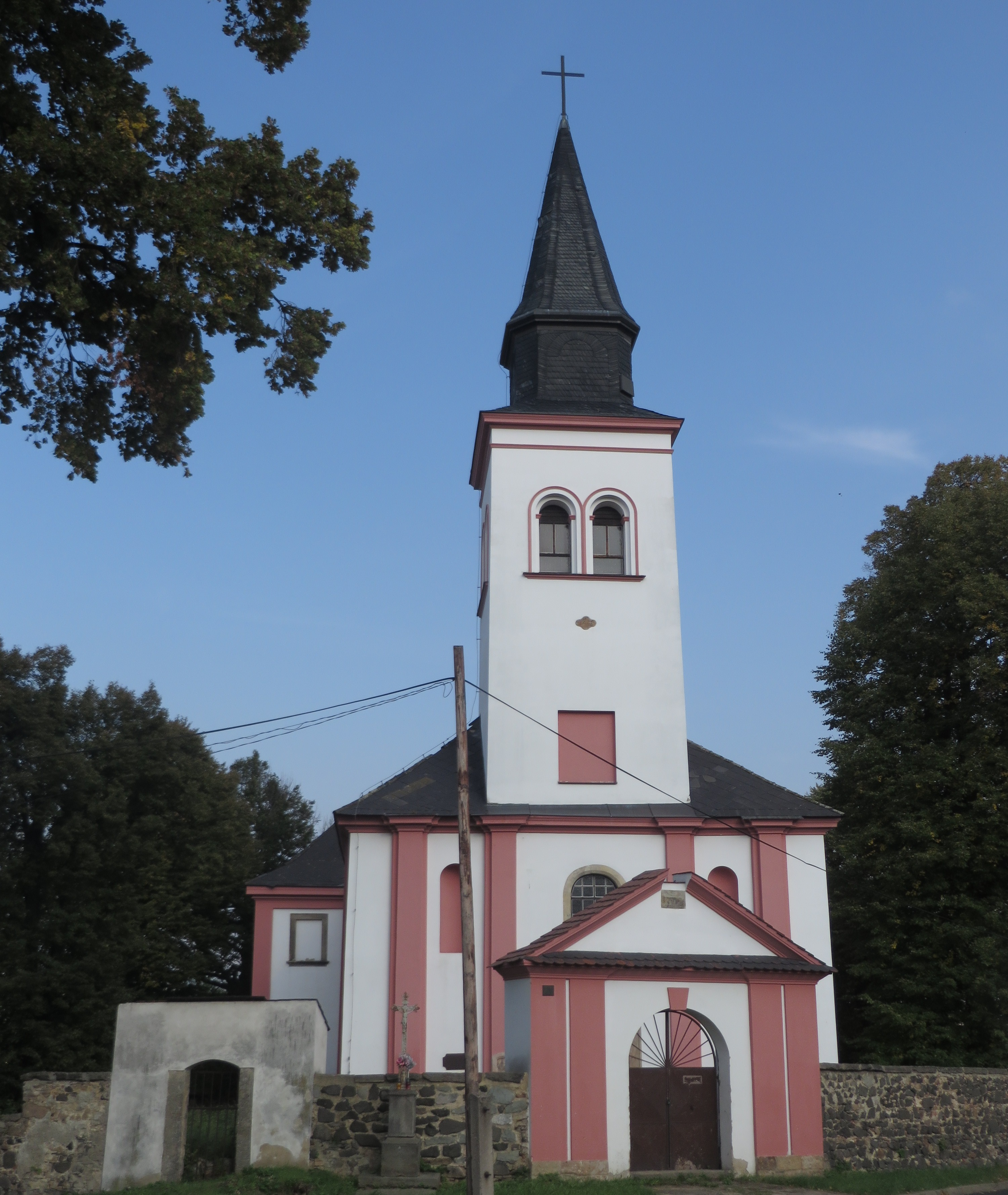 Kostel svatého Mikuláše (Všebořice)